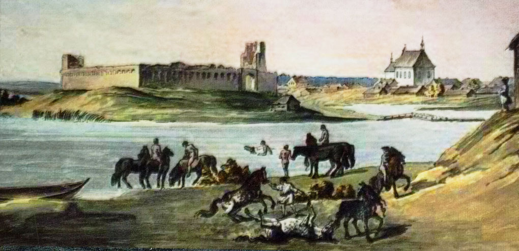 Выгляд Лідскага замка на пачатку ХІХ стБеларуская (тарашкевіца): Ліда на акварэлі Ю. Пешкі